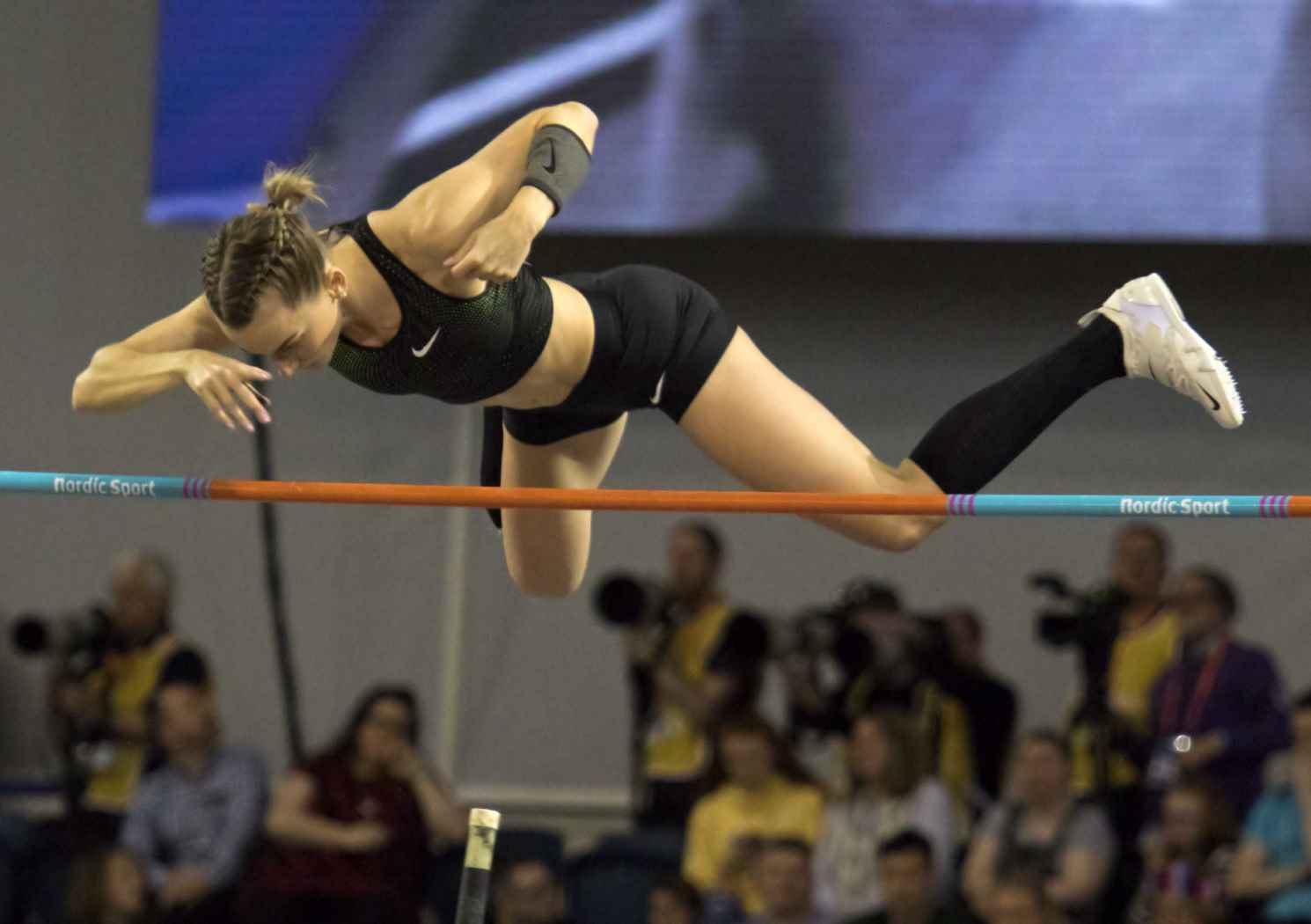 EKI30352 finale polsstok sidorova